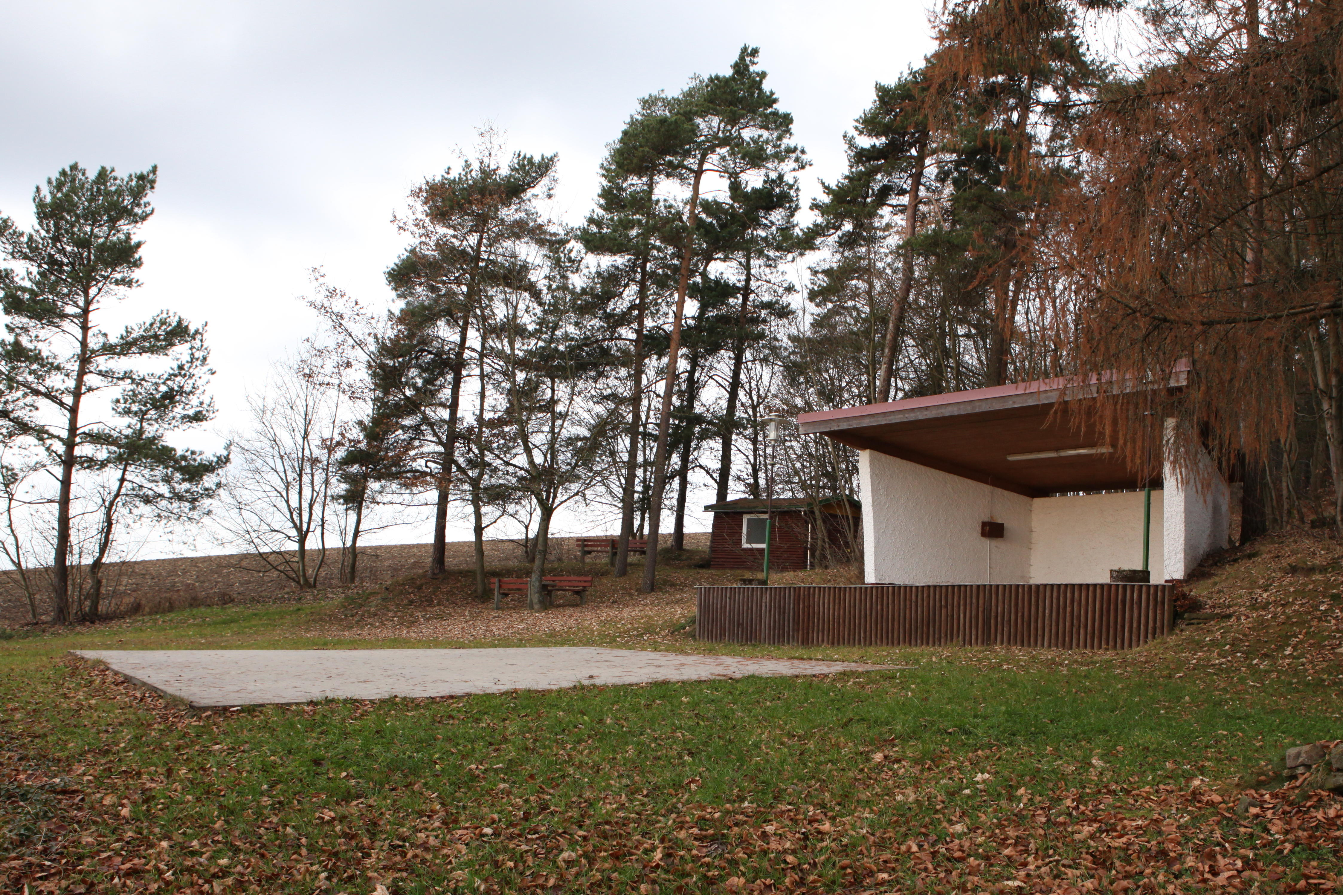 überdachte Bühne und betonierte Tanzfläche in Oberwind OT von Auengrund